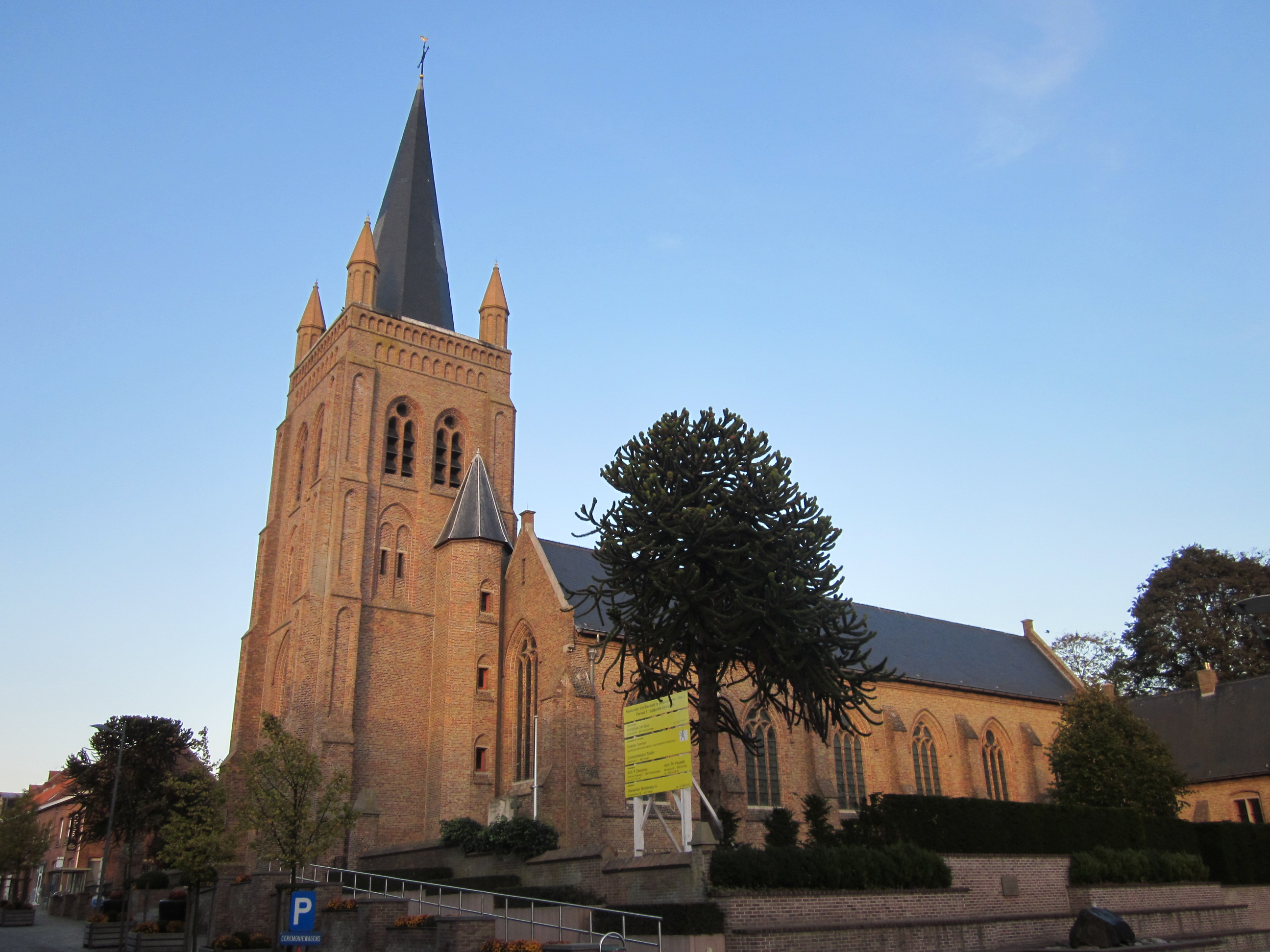 Sint-Bavokerk, Westrozebeke 9″ N, 3° 00′ 44.93″ E